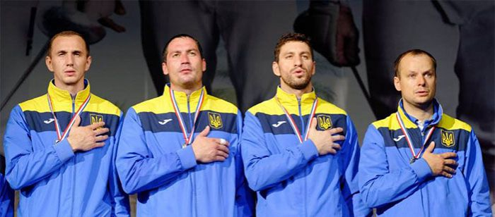 Ukraine gagnants dernier tournoi